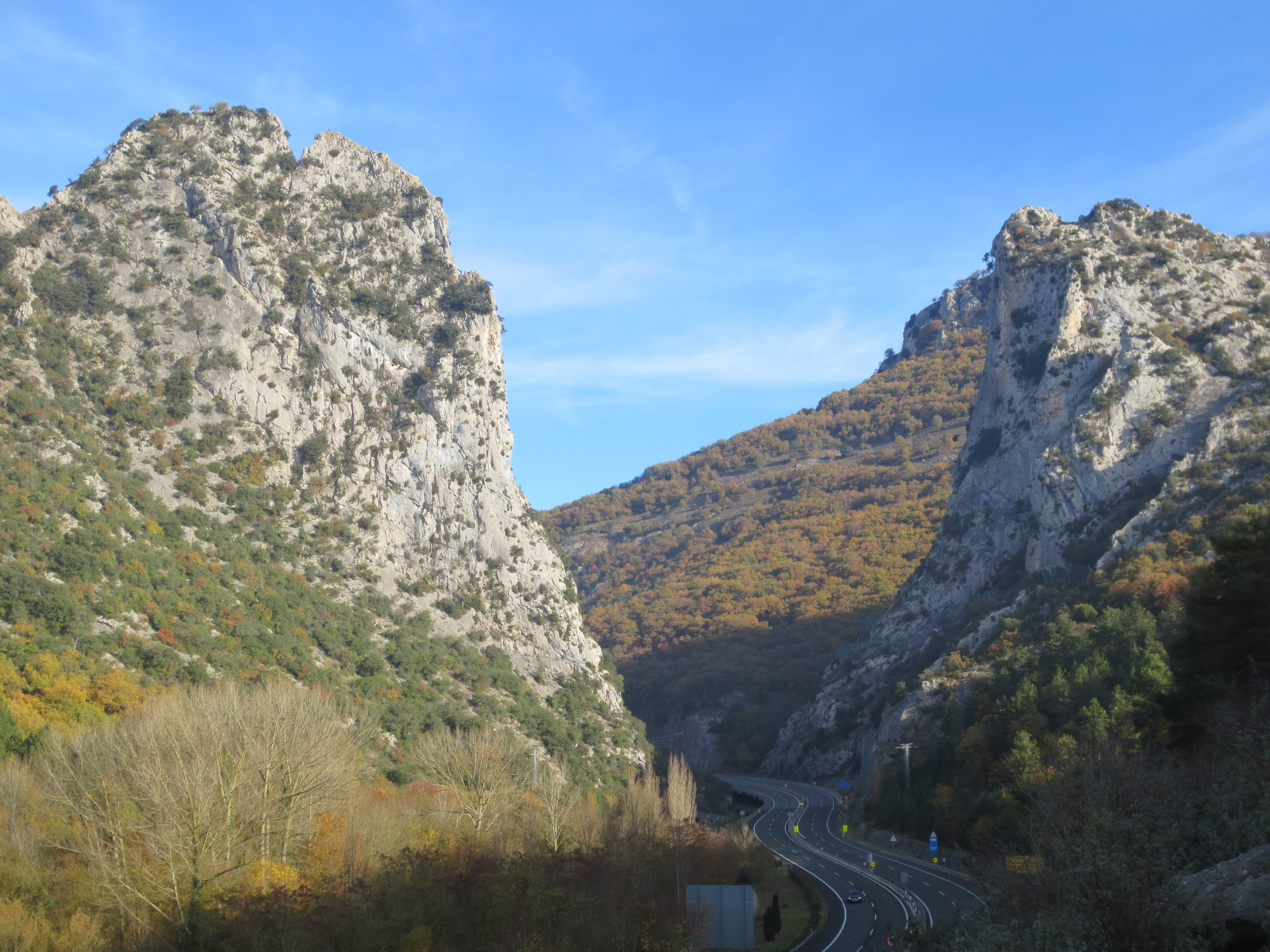 Biaizpe edo Bi Haizpe, Irurtzunetik ipar-mendebaldera